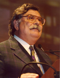 Il Prof. Passali durante una relazione congressuale